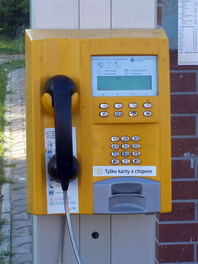 Ascom_eXANTO, Szczecin, Poland